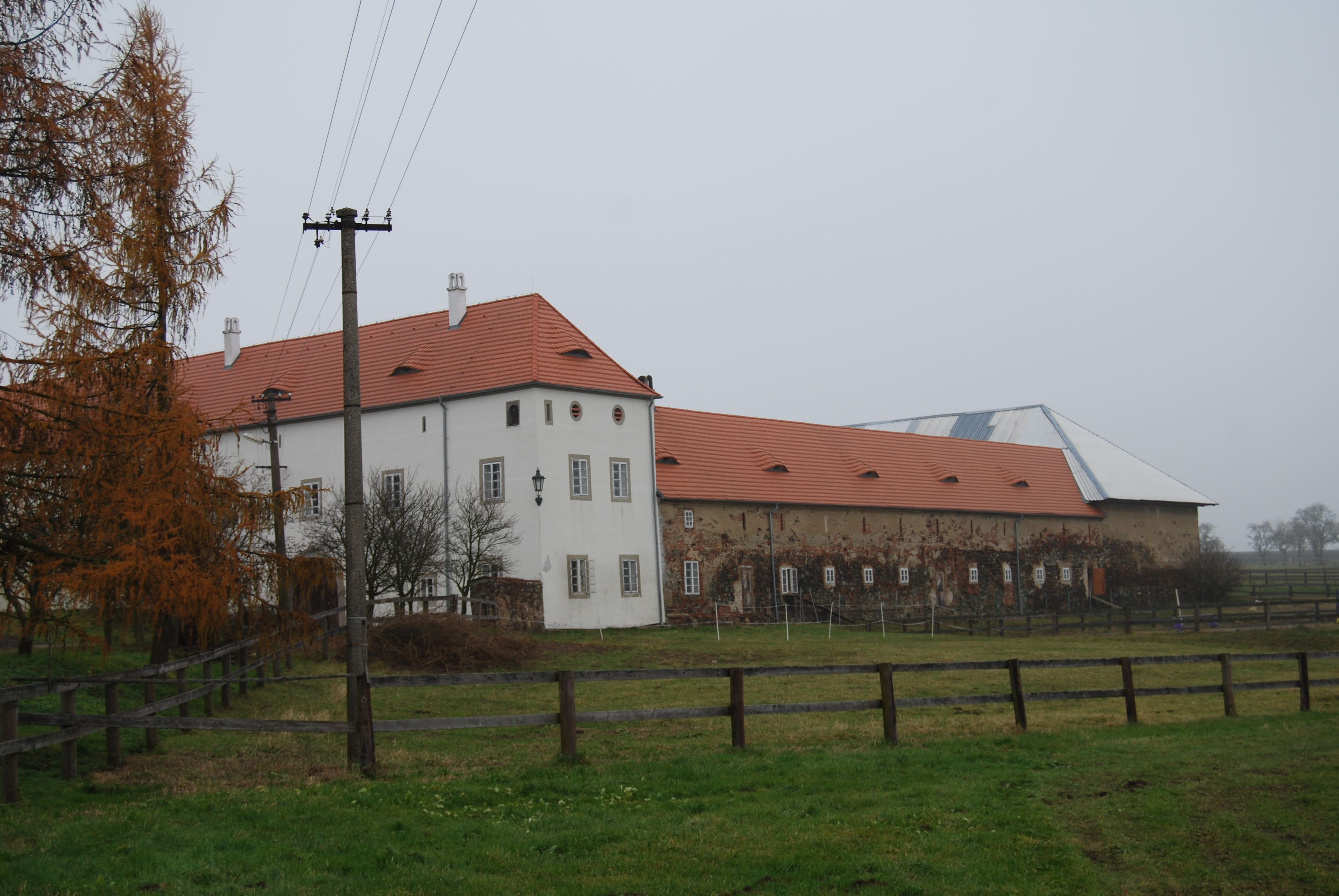 Tvrz v obci. Draheničky je část obce Mišovice v okrese Písek. Česká republika.